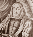 Francesco Da Lemene (1634-1704), librettista italiano